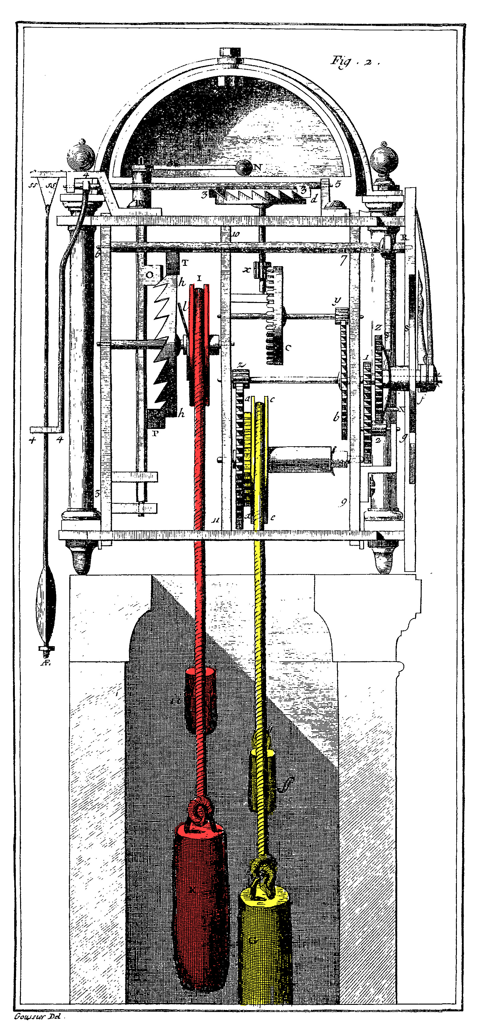 Réveil à poids : poids et contrepoids moteurs dans le mécanisme horaire (jaune) et de sonnerie (rouge).